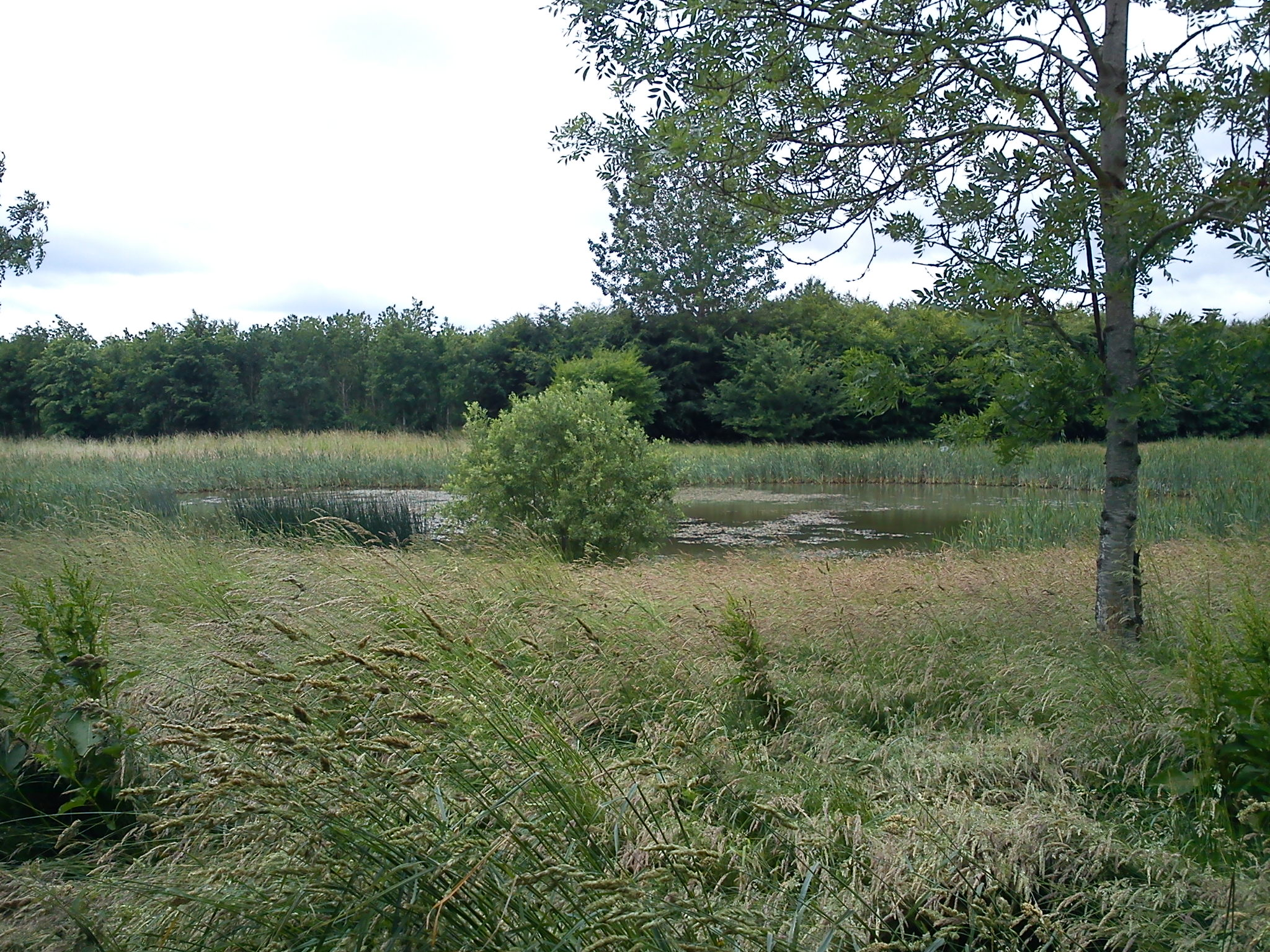 En lille sø på en større eng i True Skov.